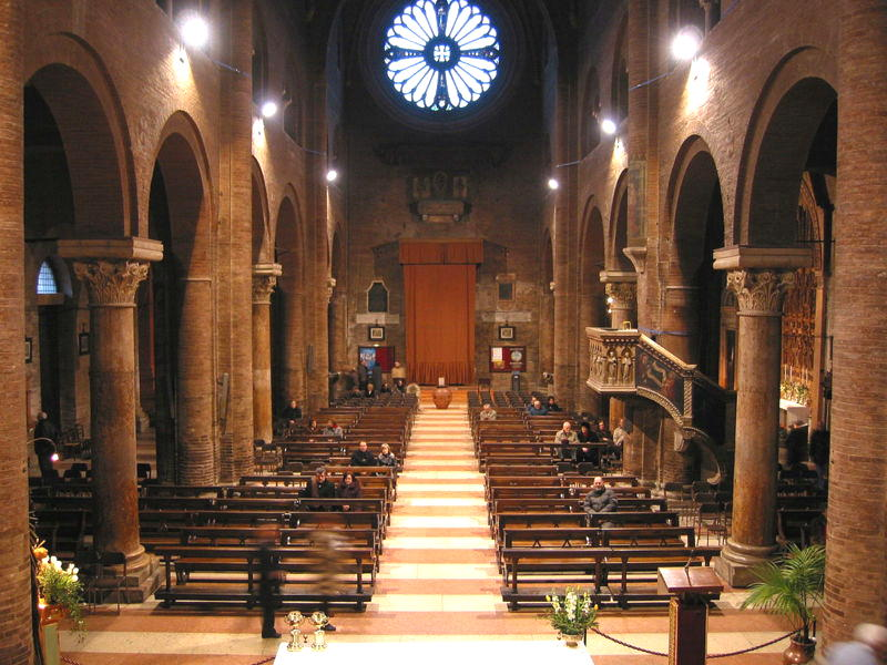 Interior de la catedral de Módena (Italia)